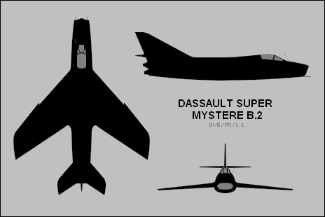 Dassault Super Mystère_3D